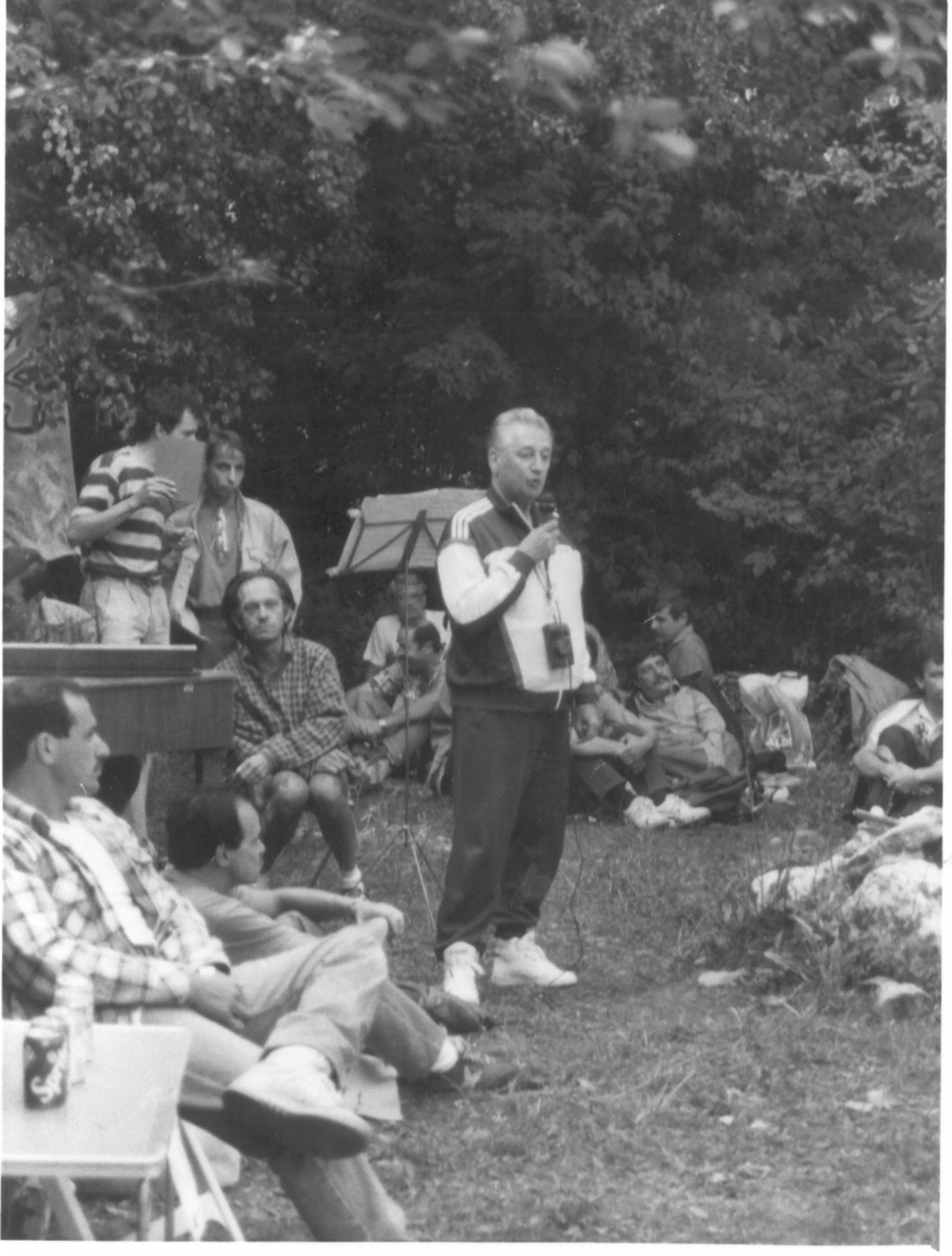 Romsauer Lajos beszél a 2. Pink Pikniken, 1193. szeptember 12-én